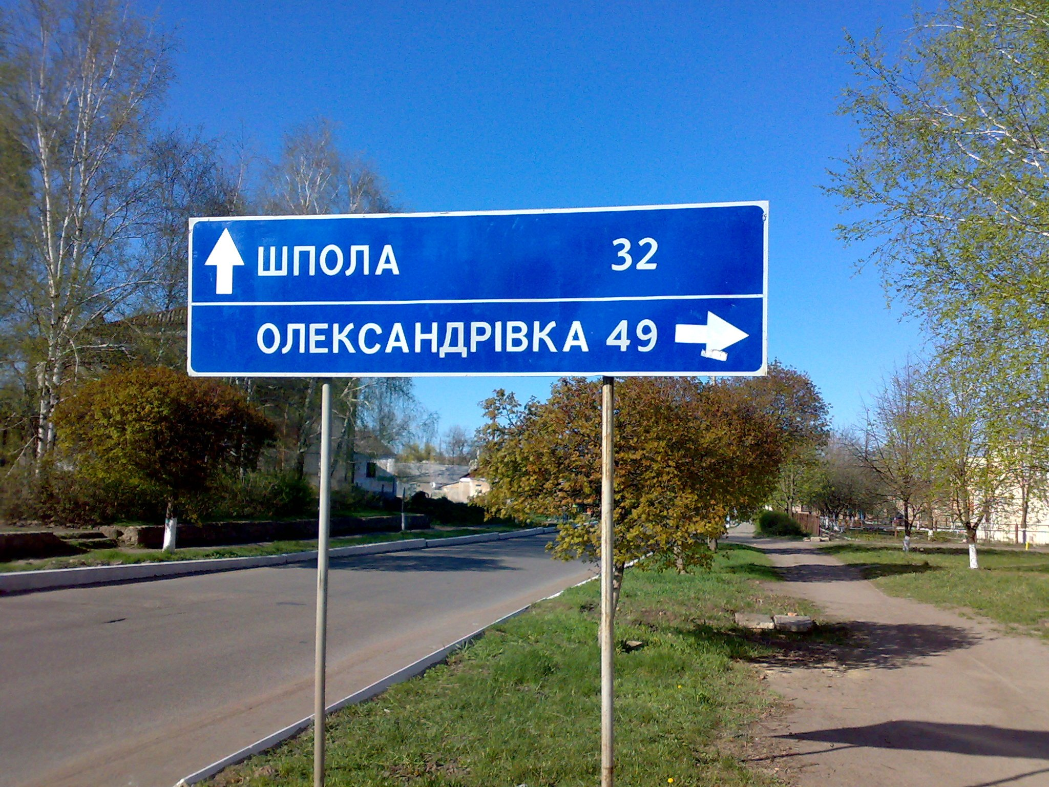 Новомиргород